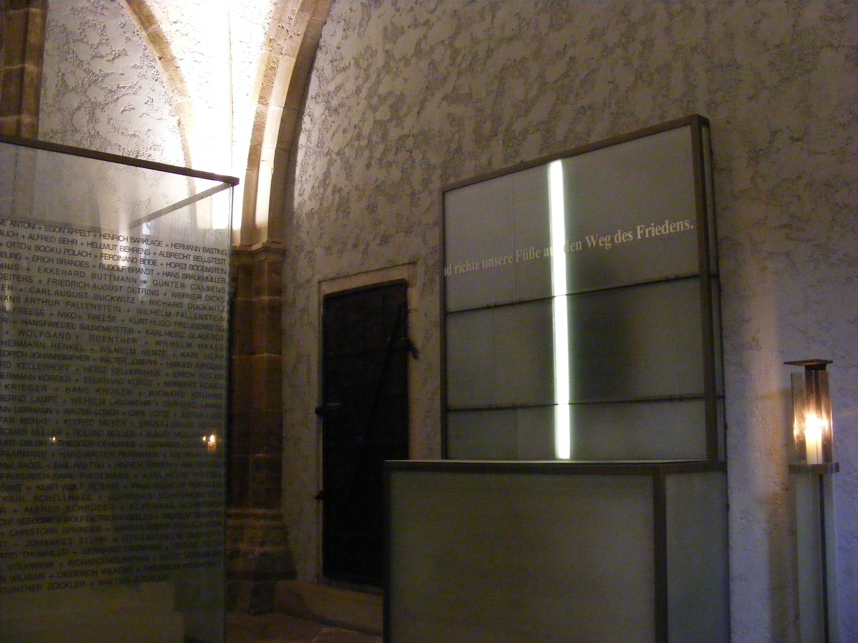 Gedächtnis- und Gebetsraum für die Getöteten aller Kriege (seit 2011) in der Kirch Unser Lieben Frauen zu Bremen